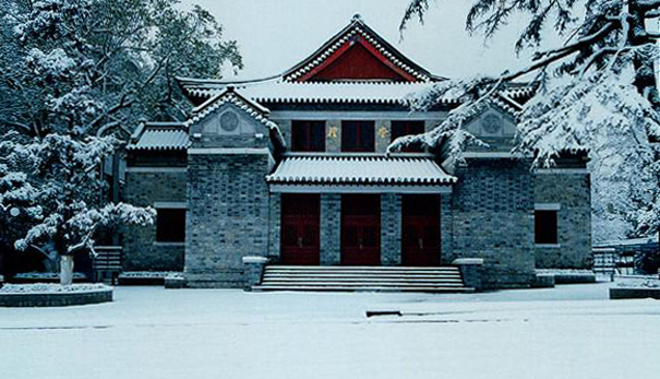 Najing-eko unibertsitatea